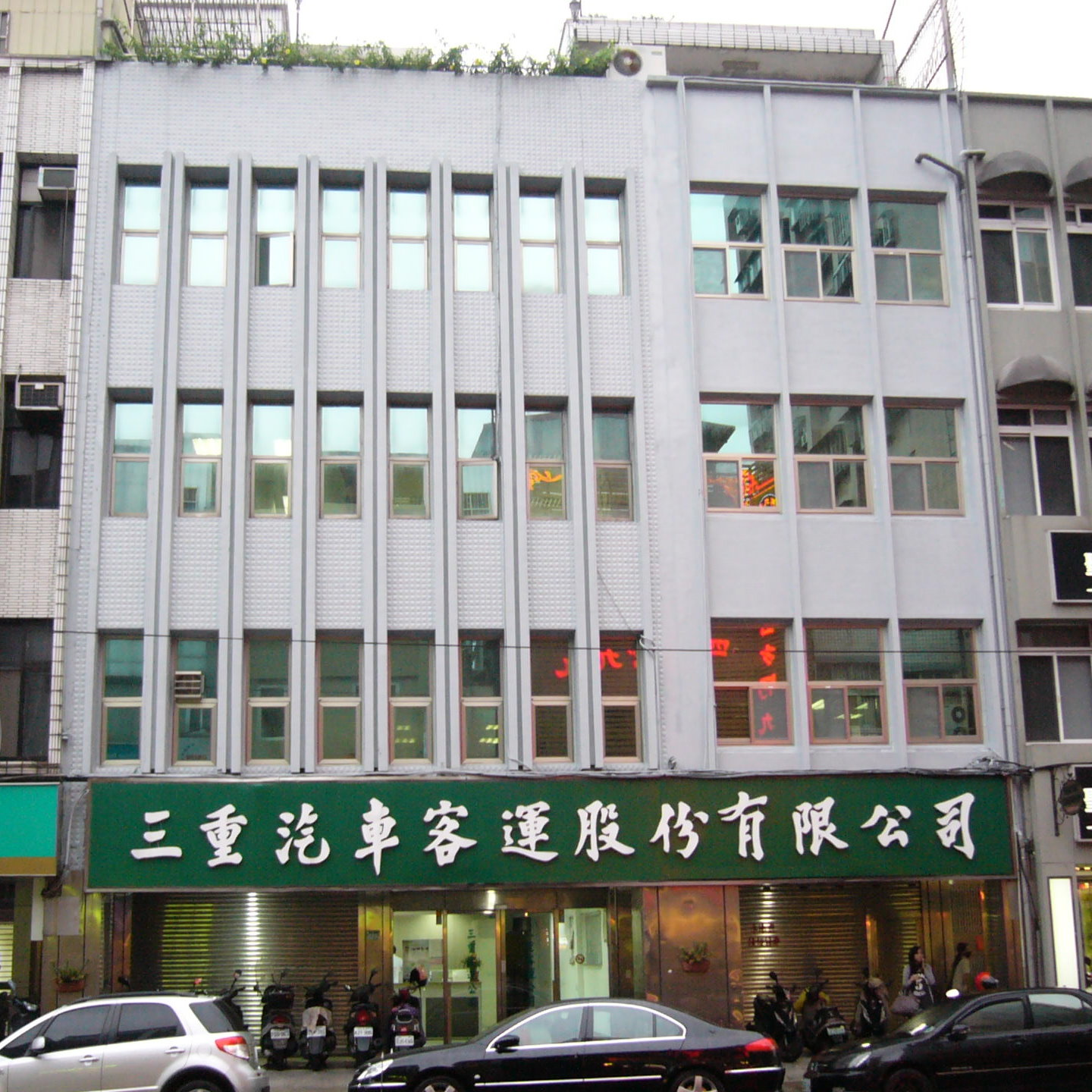 中文（台灣）: 三重客運總部，地址：新北市三重區正義北路122號。